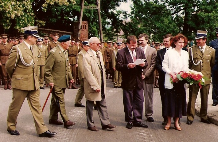 Generał Kuropieska w Trzebiatowie wśród żołnierzy 36 pz LA Autor Kerim44